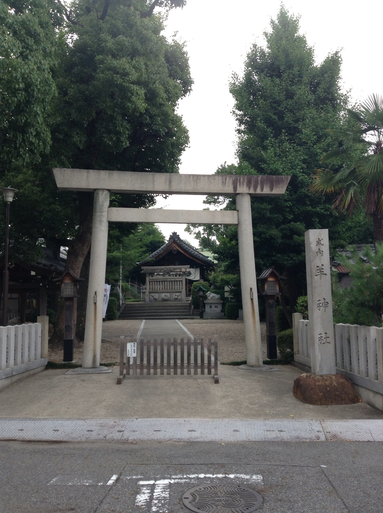 名古屋市北区辻町に鎮座する羊神社鳥居を南側公道より撮影